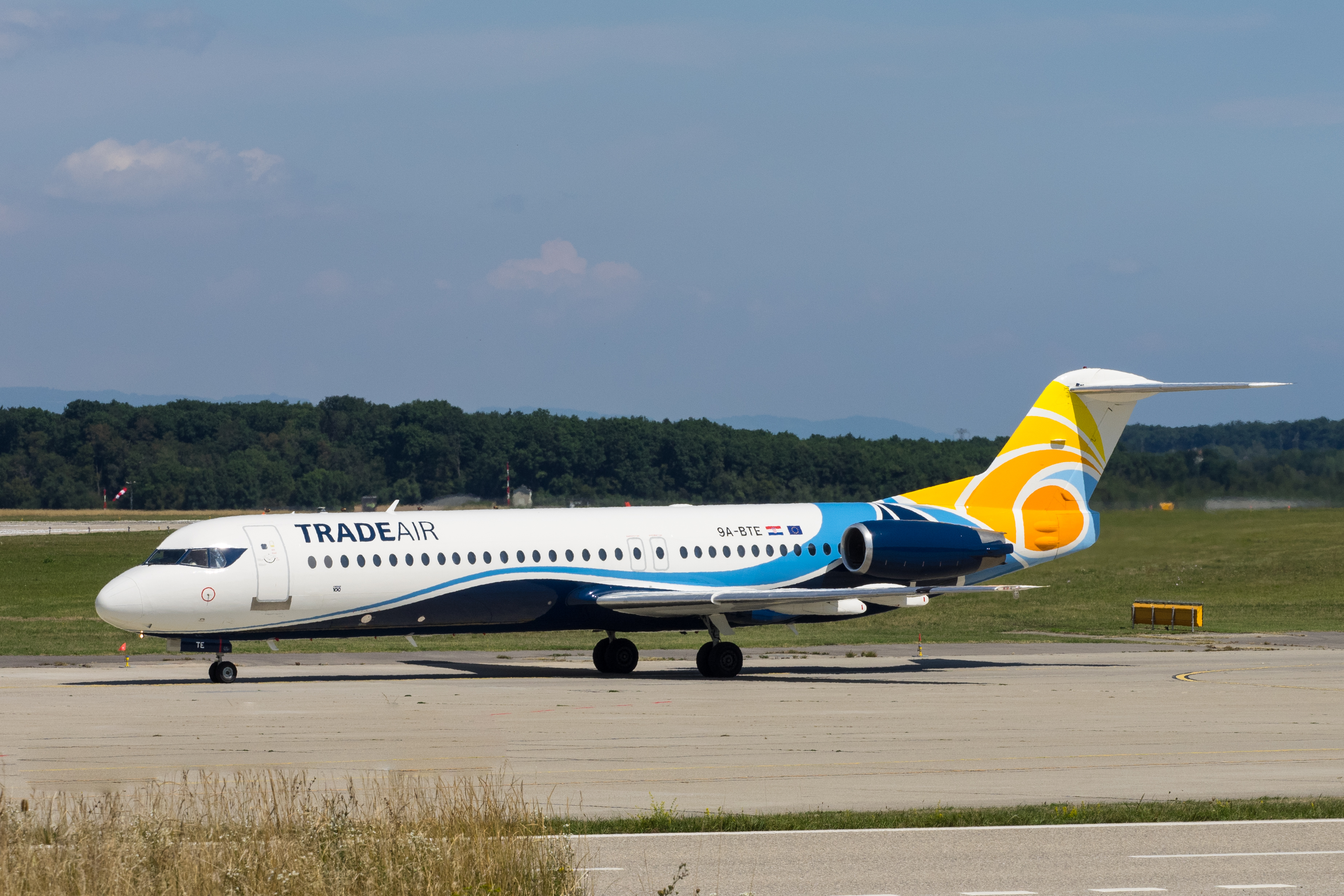 GVA 20.08.2015